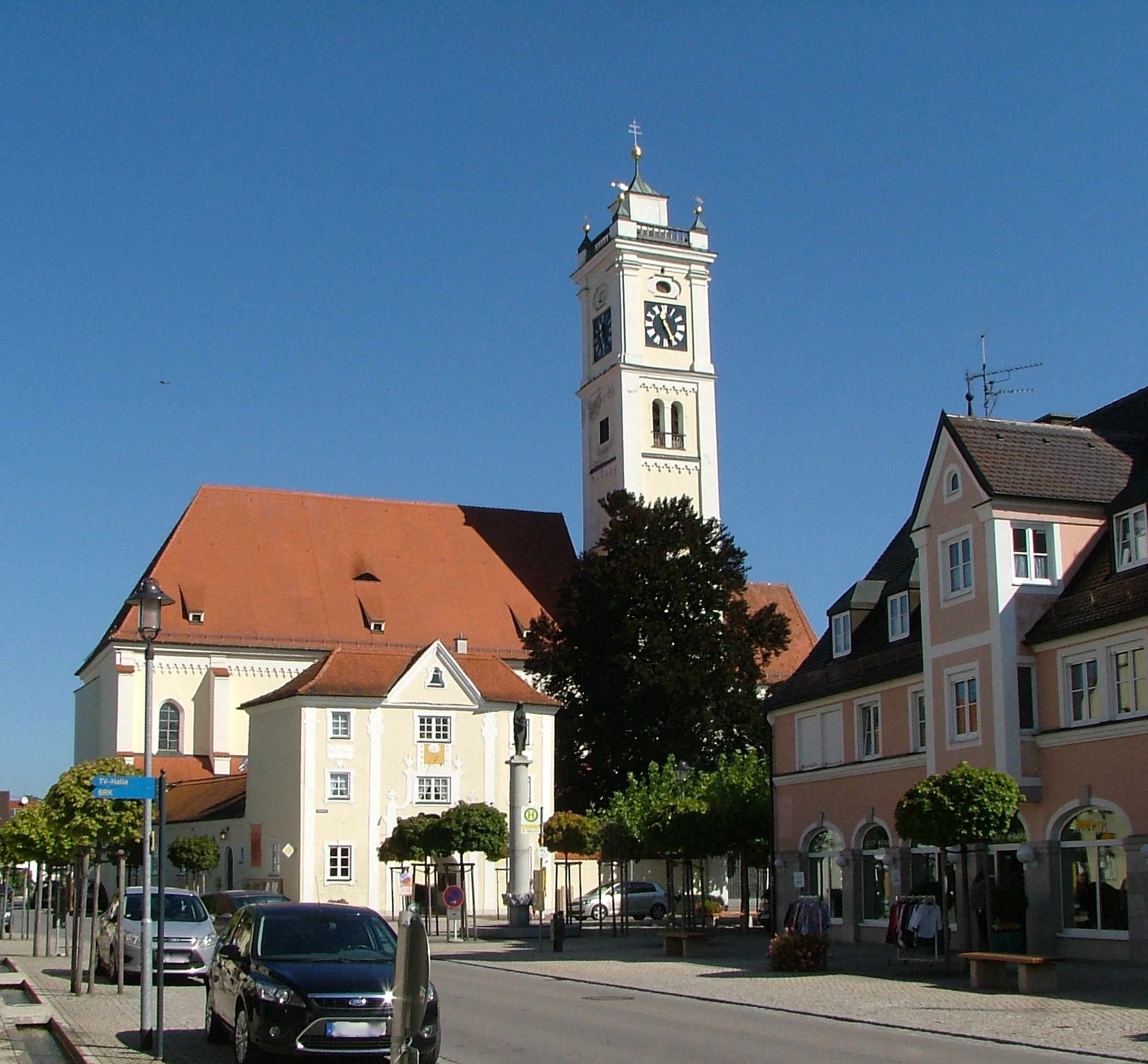 Kirche